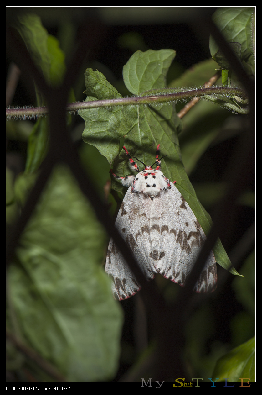 _DSJ3956 Lymantria mathura aurora